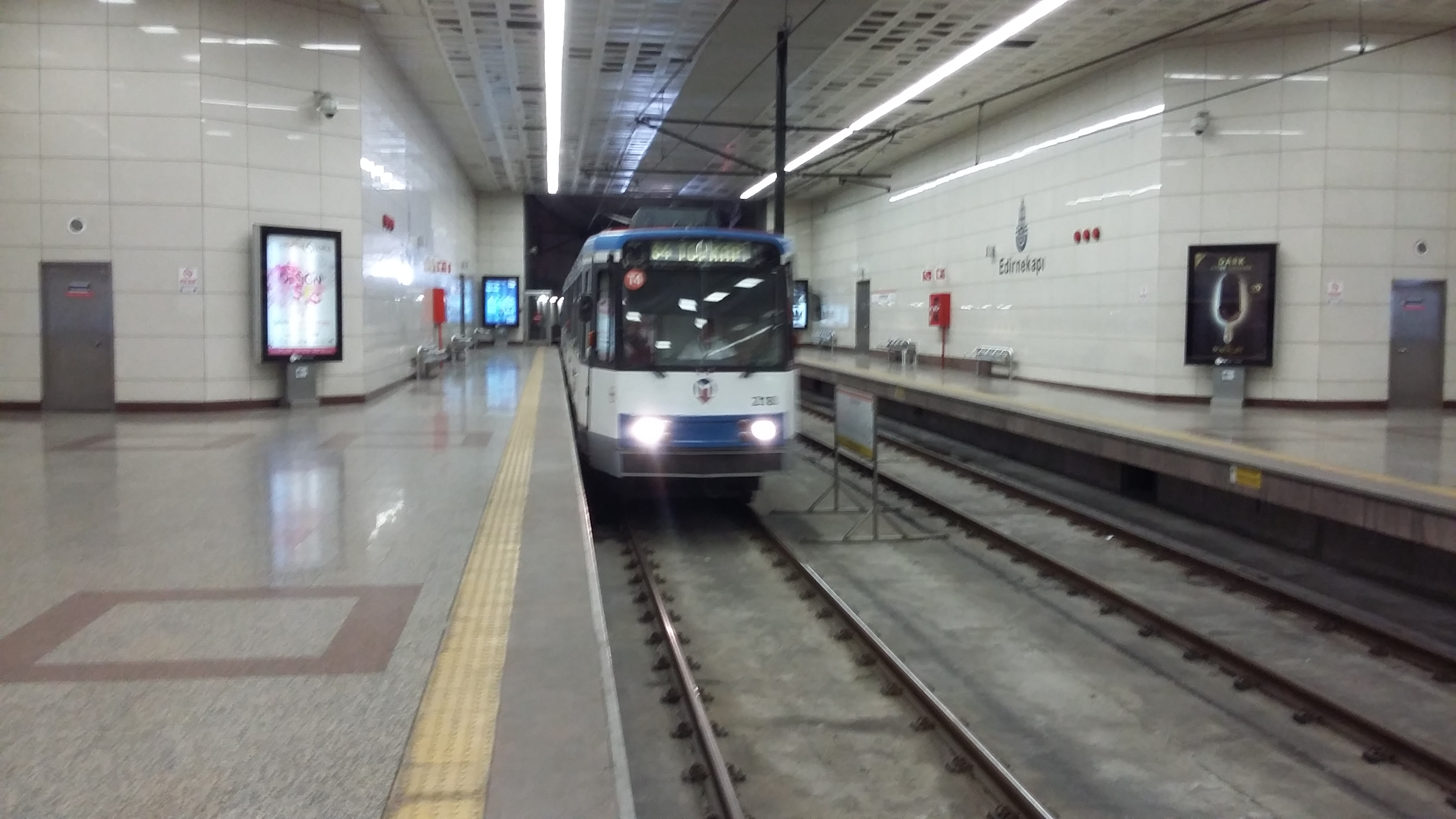 T4 Hattı Topkapı - Habibler